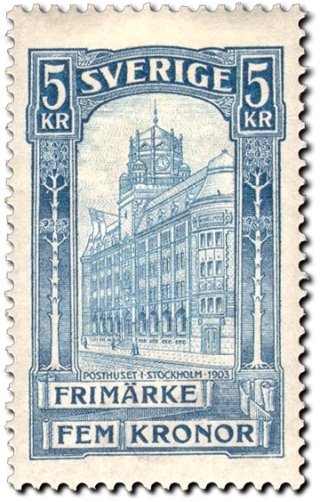 Frimärke 5 kronor 1903, från Postmuseums samlingar. Märket kom huvudsakligen till användning på paketavier och assurerade brev – inrikes och utrikes. Stora mängder som stämplats 1915 till 1917 har uppenbarligen orderstämplats, dessa frimärken har aldrig suttit på någon försändelse. Posthusmärket från 1903 räknas som vårt första minnesfrimärke och vårt tidigaste motivmärke. Den godkända förlagan finns inte bevarad. Den utfördes av Ferdinand Boberg som också var den arkitekt som skapade posthusbyggnaden. Upplaga: 314 215, 5 kr. Märkena framställdes med vattenmärke krona (två på varje frimärke). Ogiltiga till frankering fr. o. m. den 1 mars 1961.